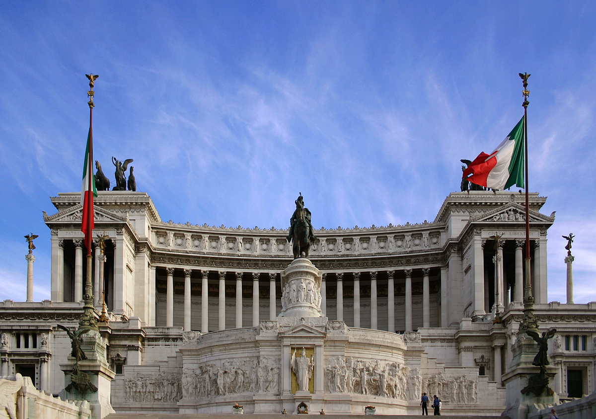 Nationaldenkmal für Viktor Emanuel II, Rom